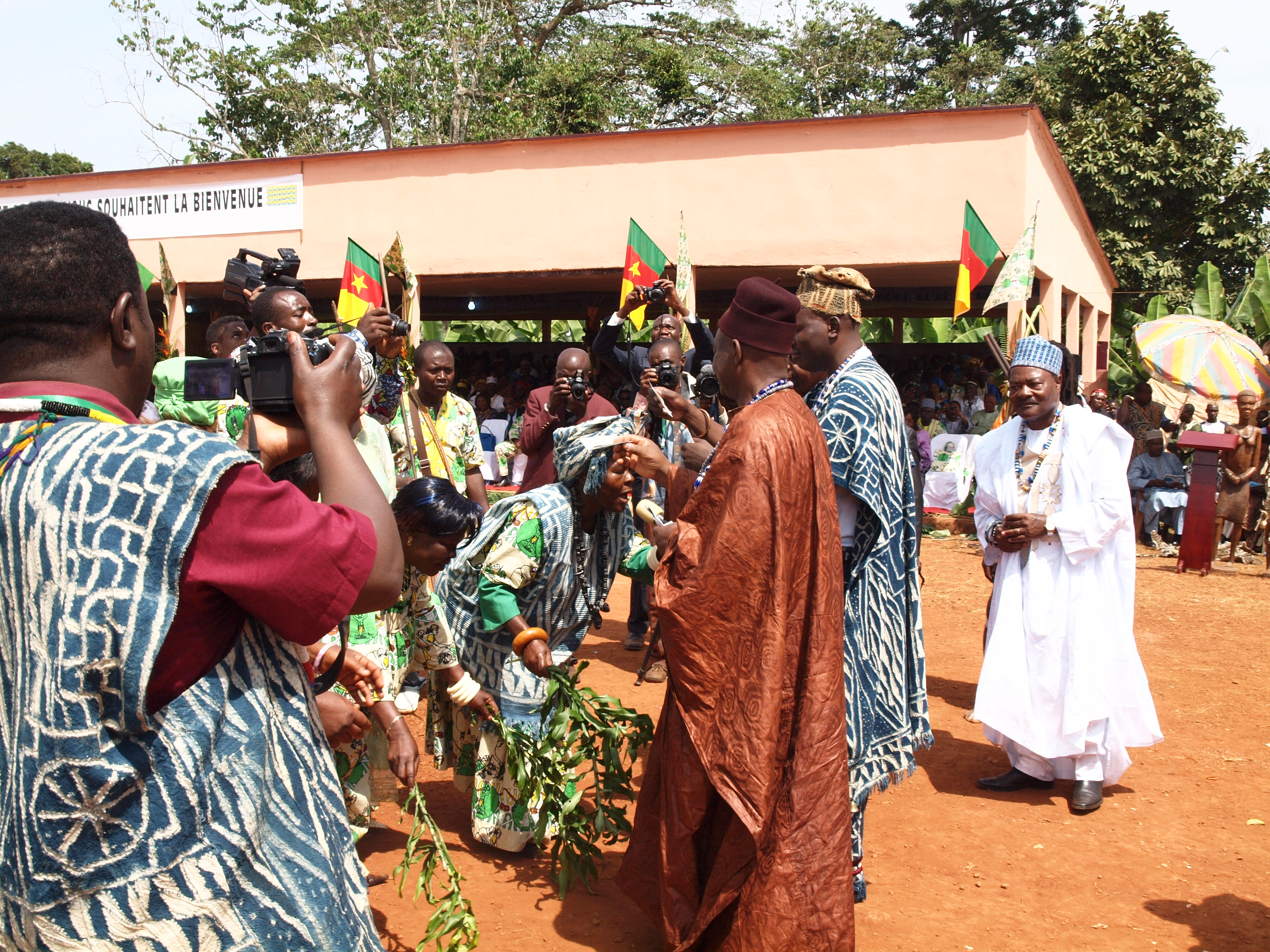 Festival du macabo à Bangoua, région de l'Ouest du Cameroun, département du Ndé This is an image of music and dance from Cameroon